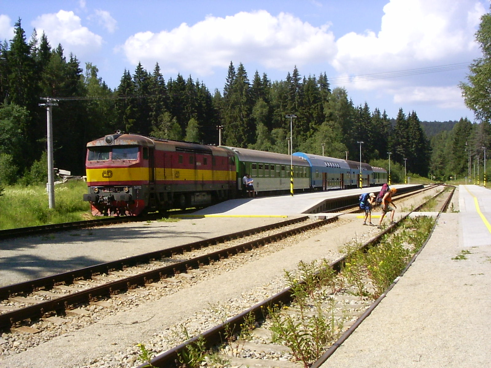 Langstreckenzug in Schwarzes Kreuz (cz)